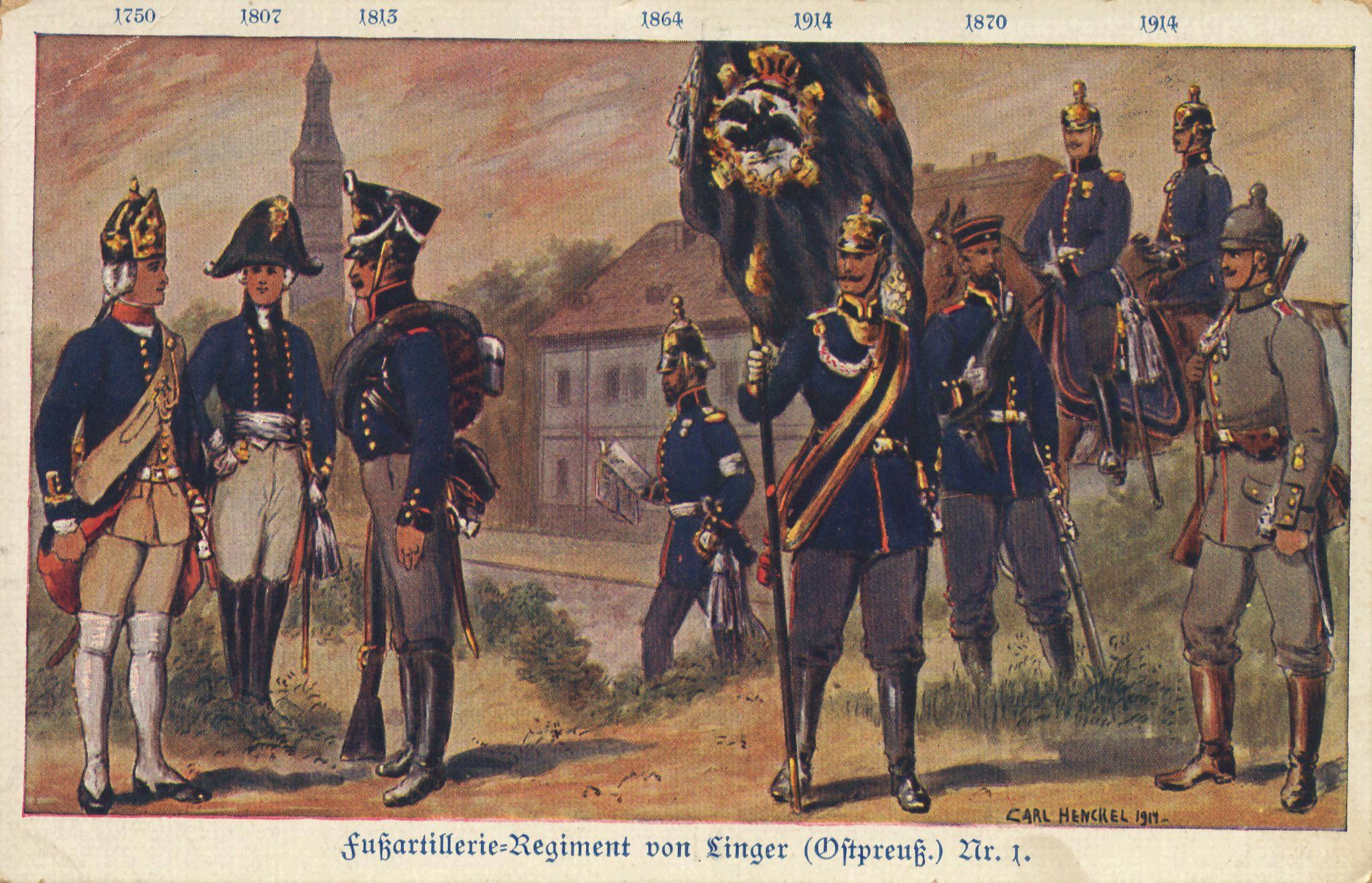 Uniformübersicht der preuss. Fußartillerie 1705-1914